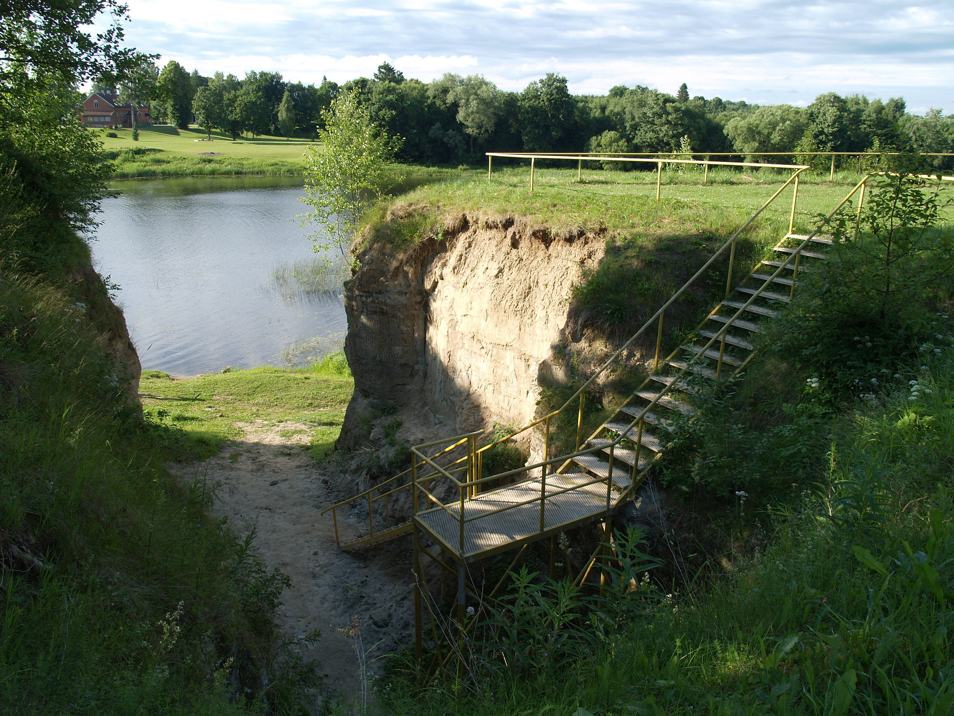 Kesk-Devoni liivakivipaljand Pärnu maakonnas Tori vallas.